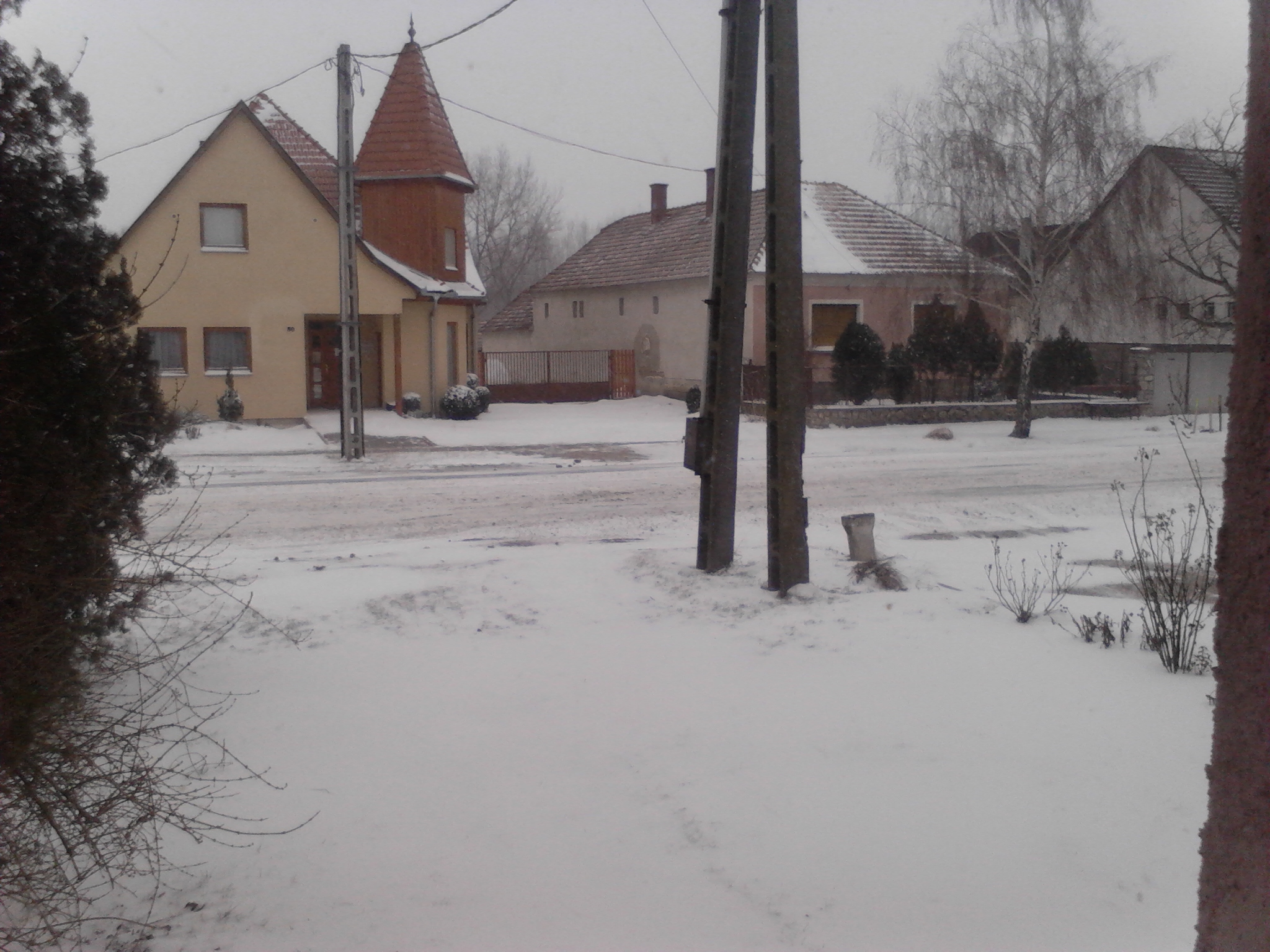 Takácsi hóesés 2012.02.07